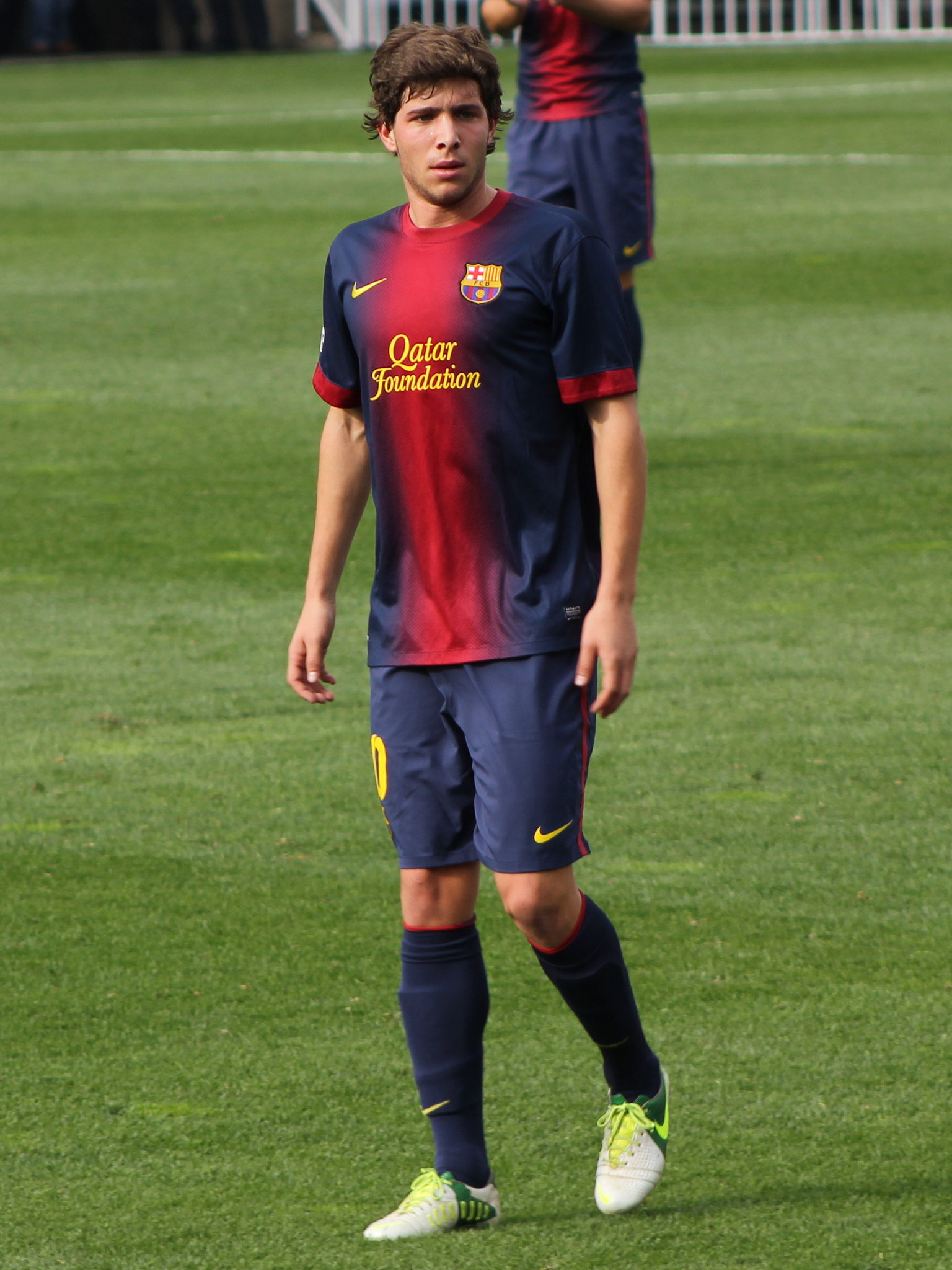 Foto realizada por Javier Segura (@castroquini)